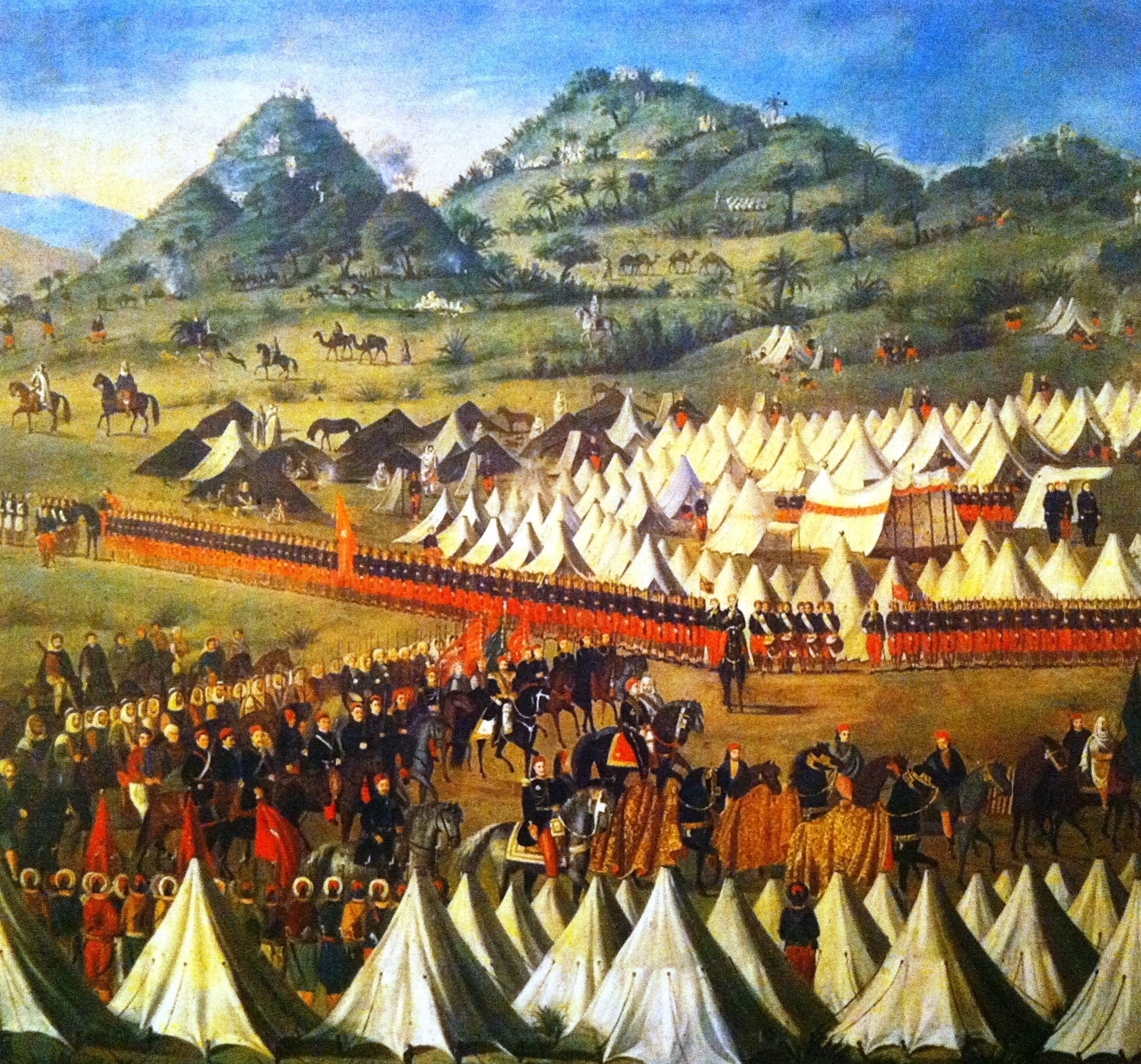 Le camp de la m'halla Tableau illustrant le camp de la m'halla parcourant la Tunisie afin de collecter les impôts, en l'occurence celle menée dans le nord-ouest par Ali Bey, prince héritier de Sadok Bey Huile sur toile, 181 x 220 cm Tunis, musée militaire national, palais de la Rose, inv. 245